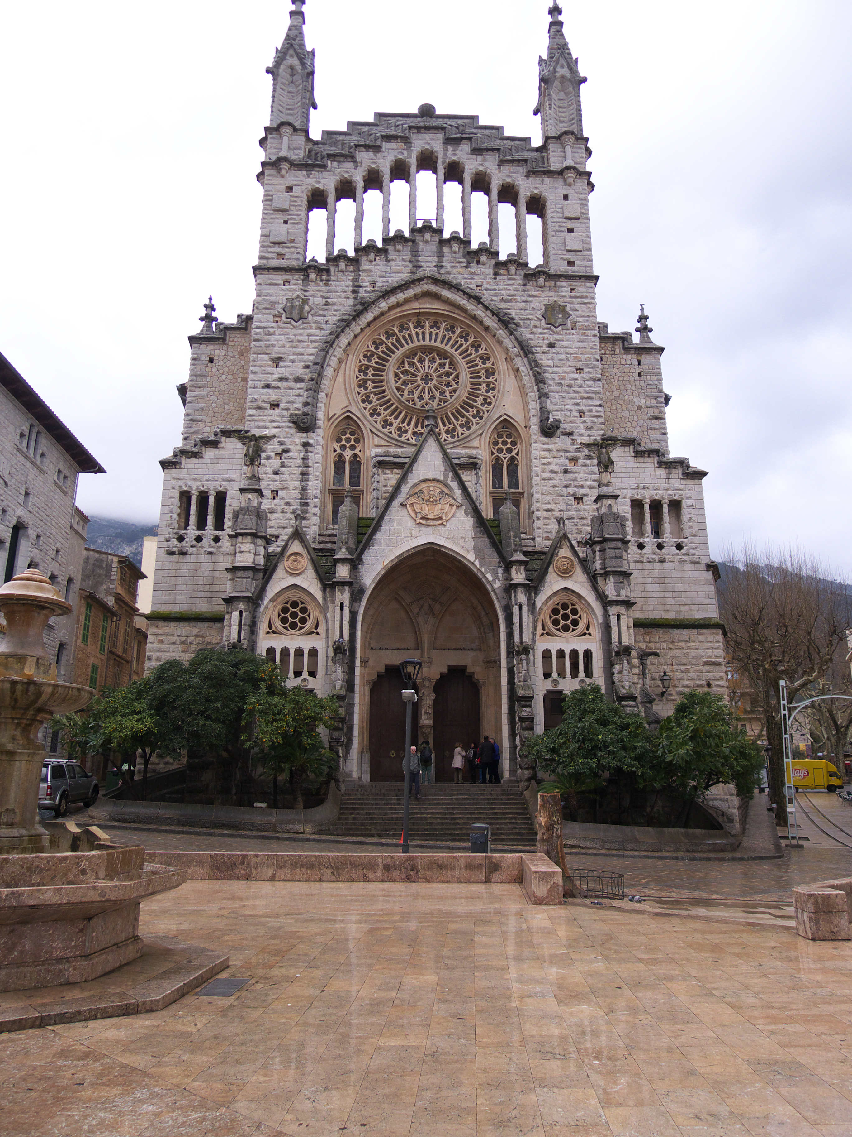 Obra de Joan Rubió i Bellver (1904)